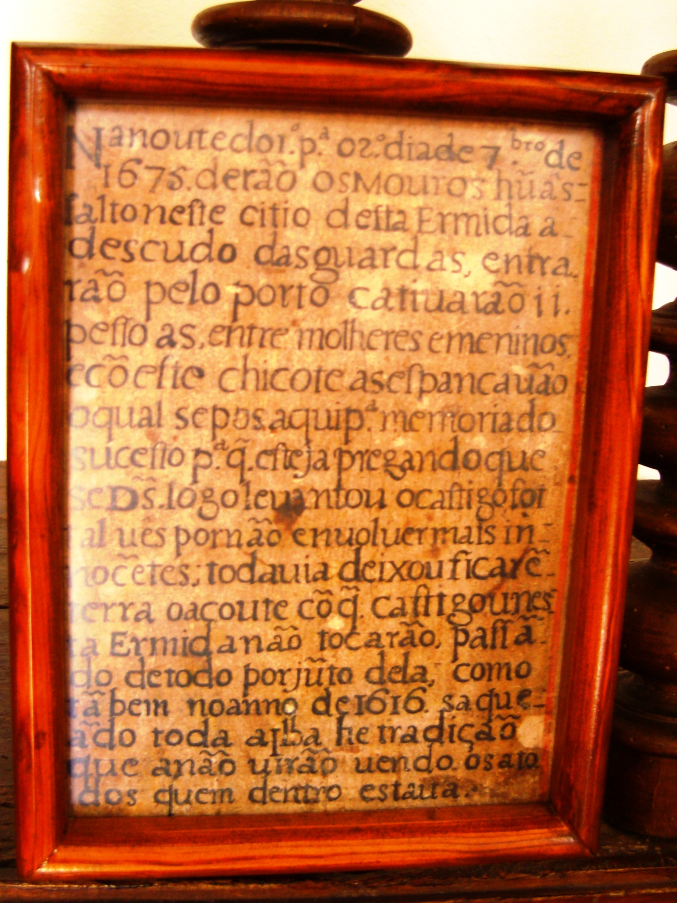 Ermida de Nossa Senhora dos Anjos, freguesia e concelho de Vila do Porto, ilha de Santa Maria, Açores: memória dos assaltos de piratas da Barbária.